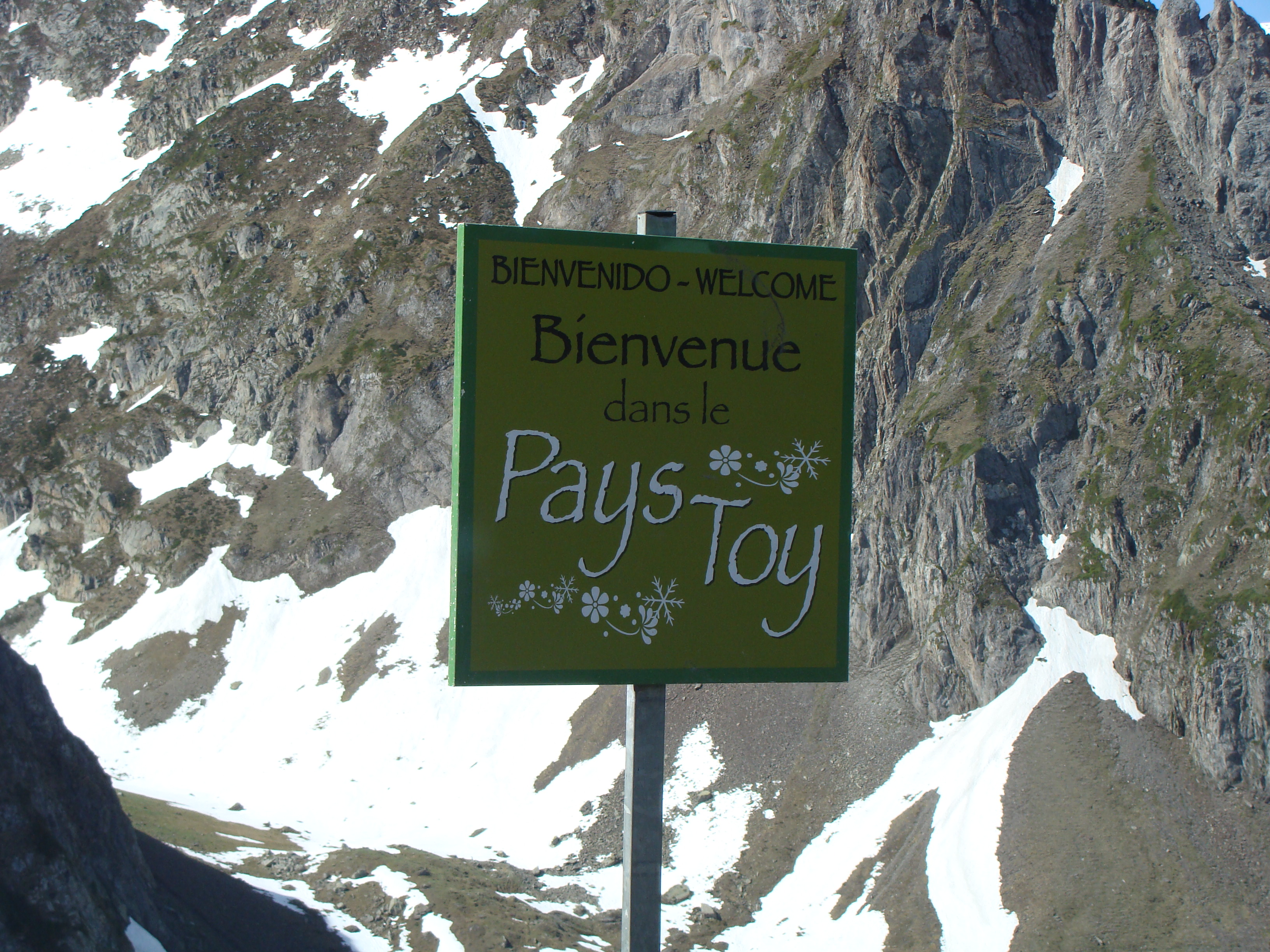 Pays Toy - Hautes-Pyrénées